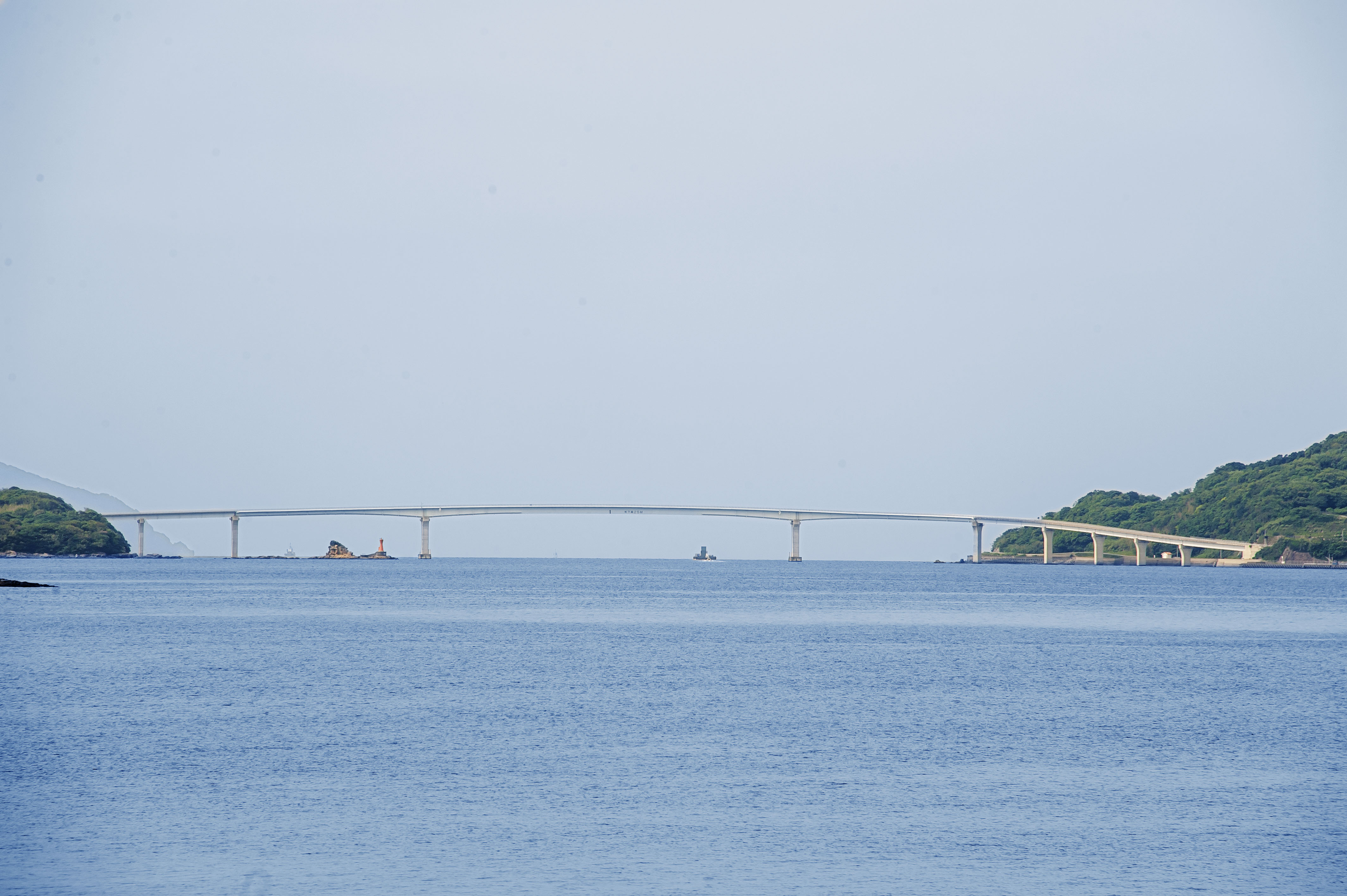 伊王島大橋全体の様子